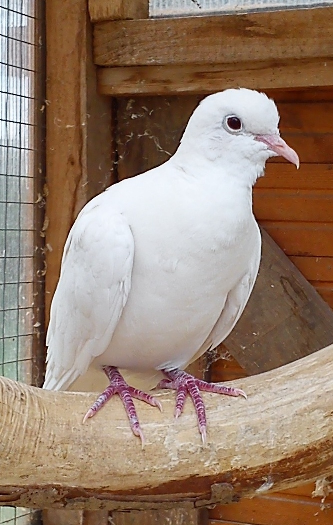 Белый голубь